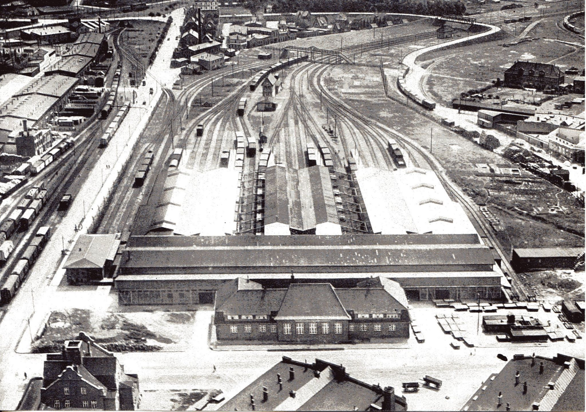 Fischversandbahnhof im Fischereihafen von Wesermünde (Bremerhaven)